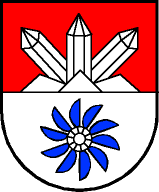 Ein geteilter Schild; oben in Rot an der Teilung aus silbernem Muttergestein ragend zwischen zwei schrägauswärts gekehrten silbernen Bergkristallen ein ebensolcher pfahlweise. Unten in Silber ein stilisiertes blaues Turbinenrad mit zehn löffelförmigen Schaufeln.